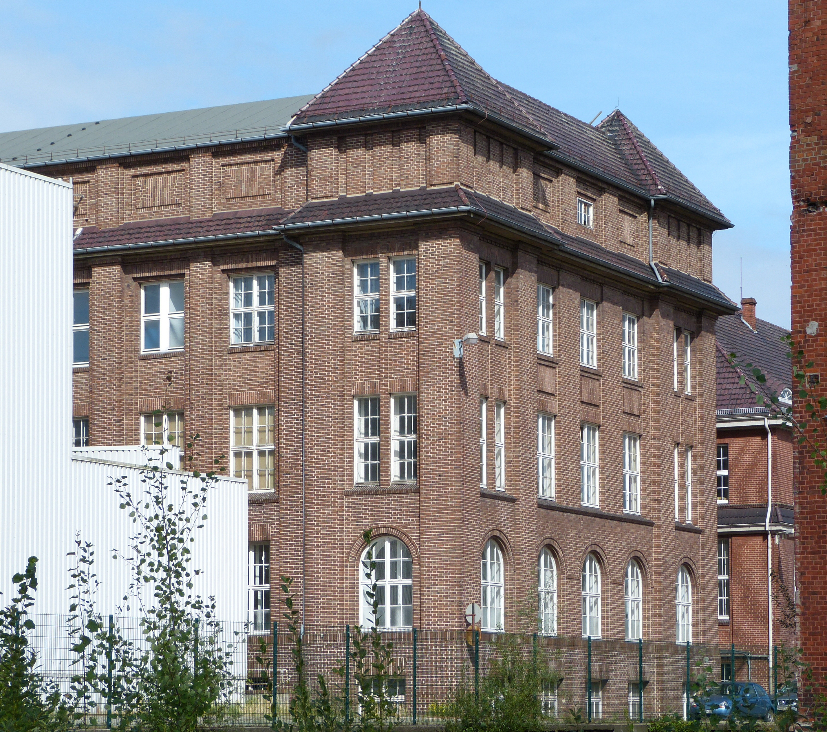 Bremer Wollkämmerei, Haus 43, Sortiergebäude in Bremen, Landrat-Christians-Straße 95Das abgebildete Objekt ist ein geschütztes Kulturdenkmal in der Freien Hansestadt Bremen, mit der Nr. 2005 beim Landesamt für Denkmalpflege registriert.